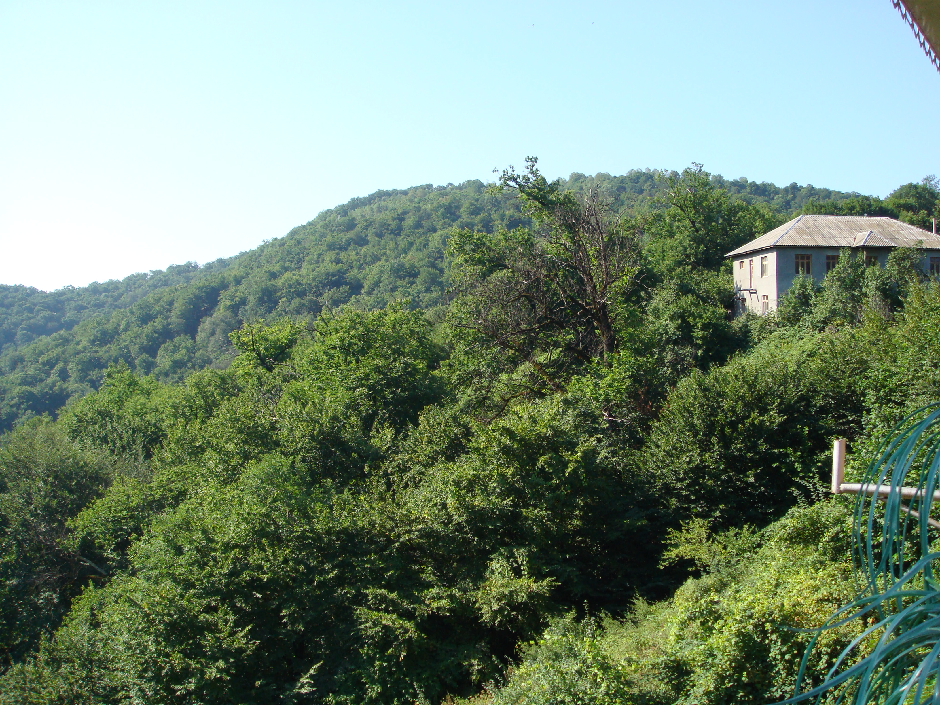 Azərbaycan təbiəti